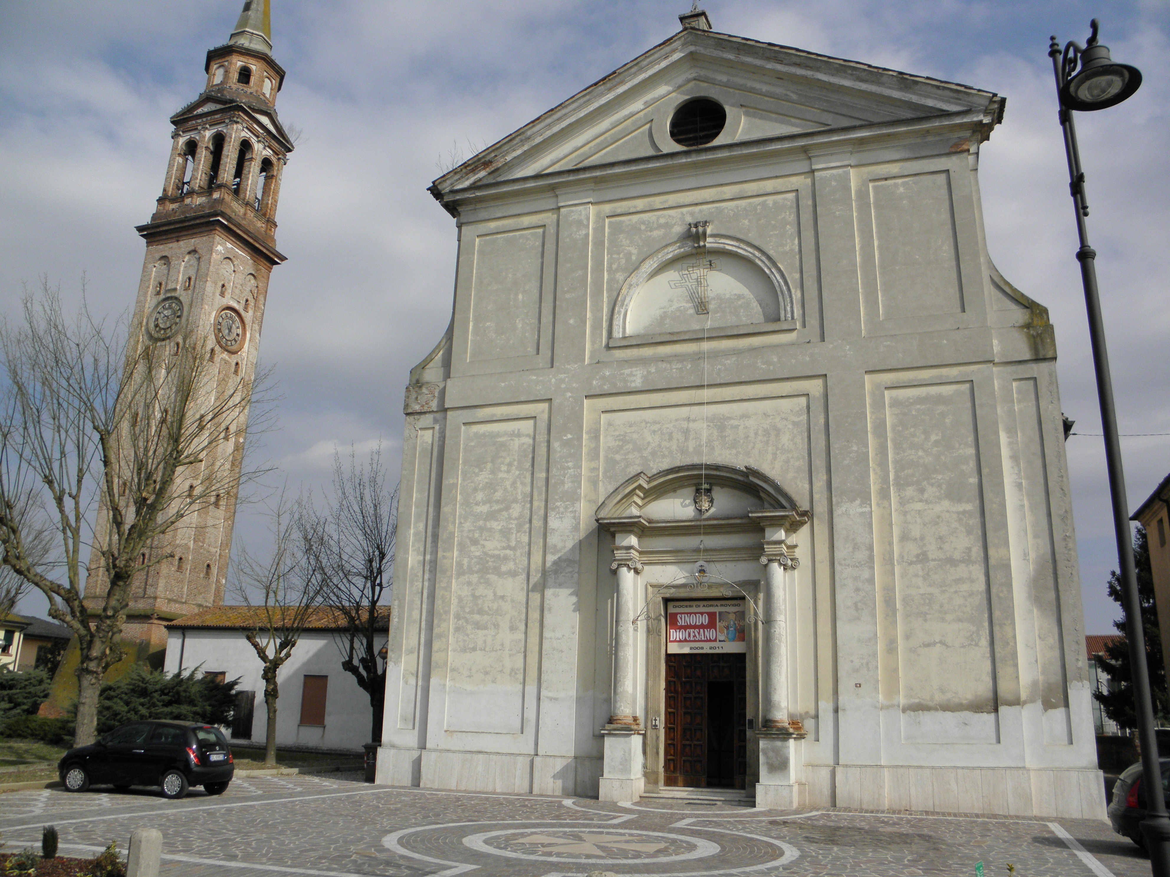 Concadirame, comune soppresso ora frazione di Rovigo: la parrocchiale dedicata alla Beata Vergine Maria del Rosario.